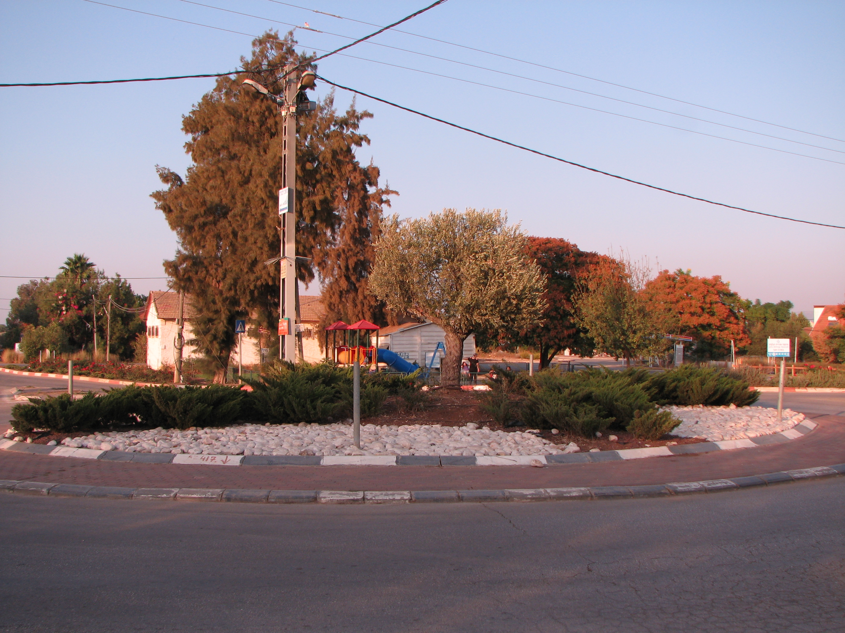 מרכז חבר